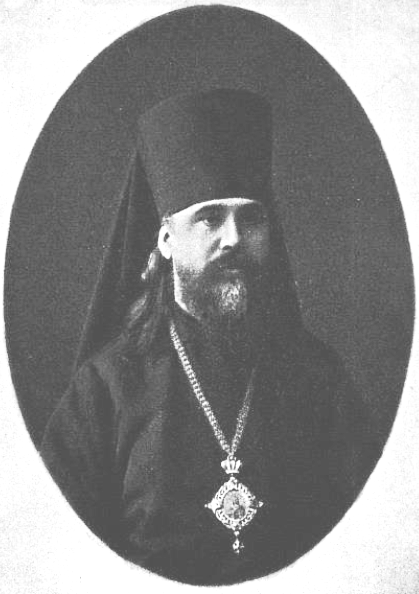 Епископ Уфимский и Мензелинский Нафанаил (Н.З.Троицкий) (1864 - 1933).